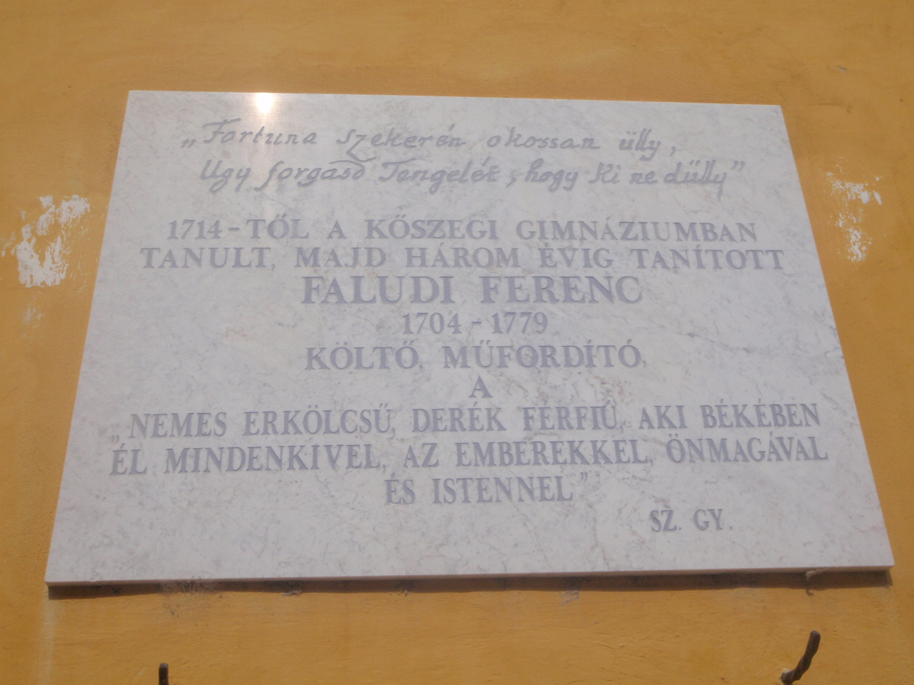 Franz Faludi Gendenktafel in Güns, Altstadt